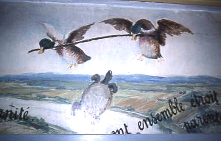 illustration de la fable de Jean de La Fontaine:La tortue et les deux canards Livre X Fable II